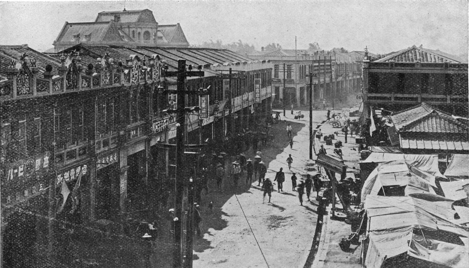 中文（台灣）: 作者：勝山吉作。斗六。典藏者：中央研究院數位物件典藏者：中央研究院數位文化中心。公眾領域標章（Public Domain Mark）。發佈於《開放博物館》 斗六是臺南州中僅次於嘉義街的熱鬧都市，三萬人口